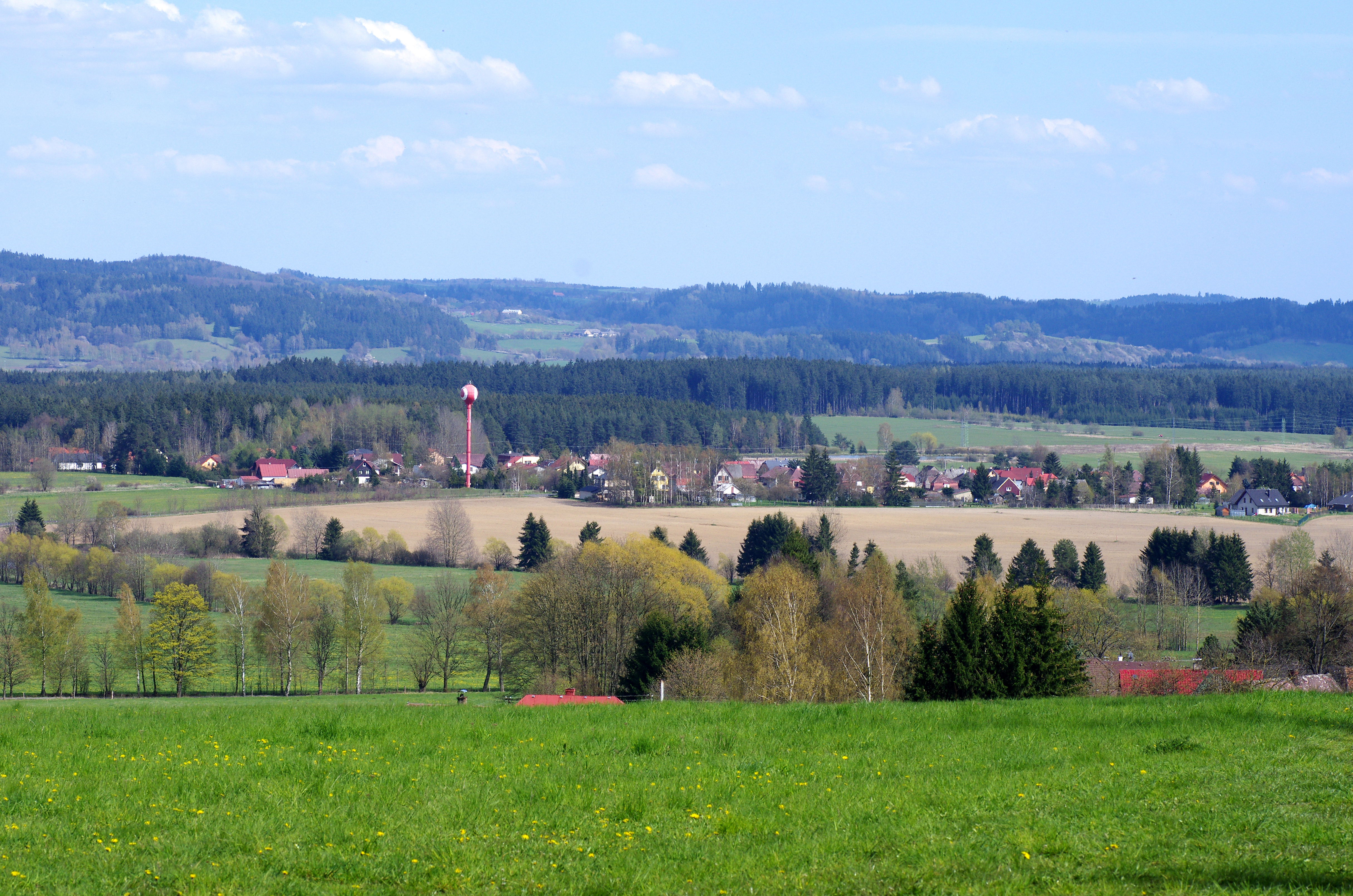 Obec Drmoul, pohled zdálky, okres Cheb